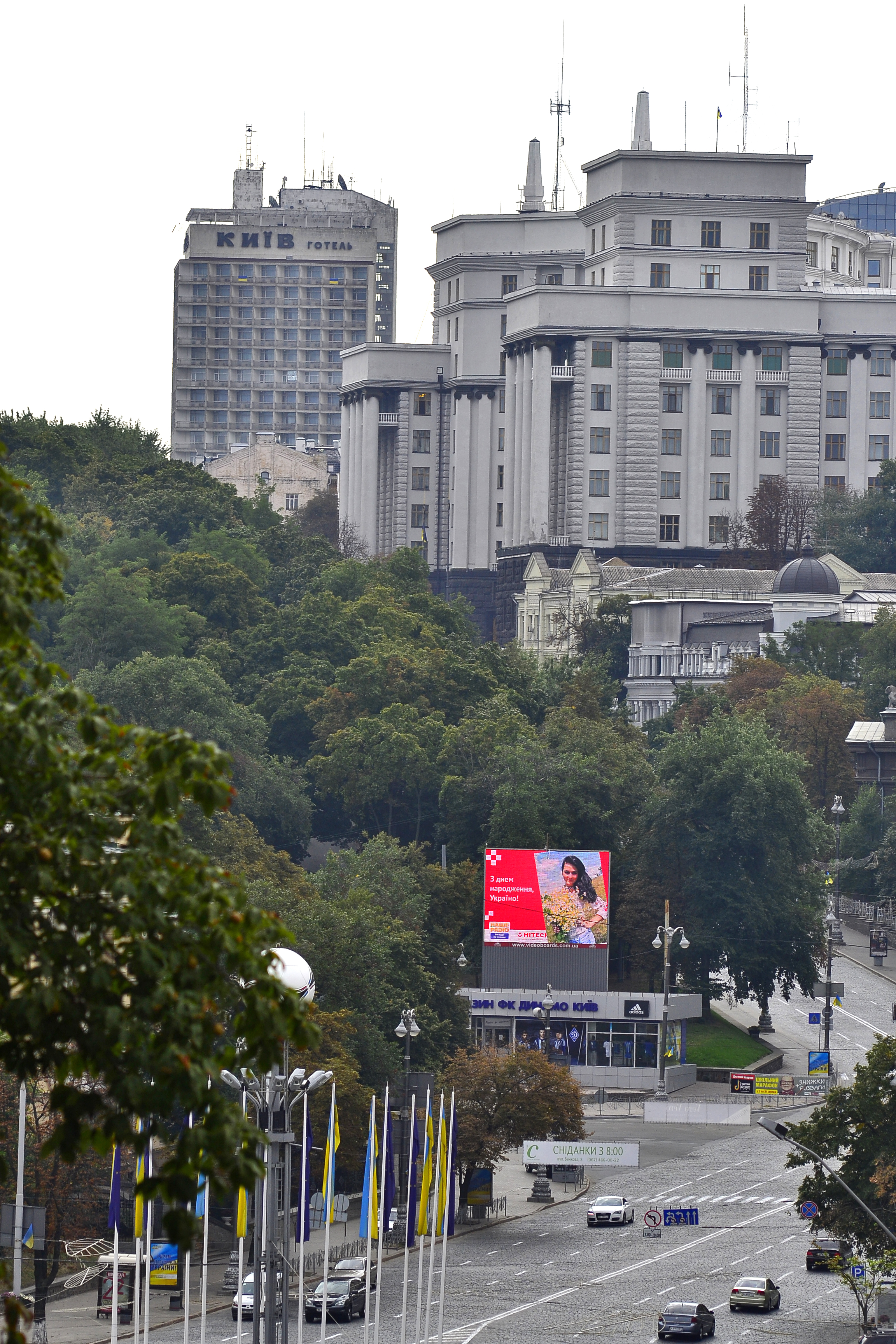 Європейська пл. та Будинок Уряду